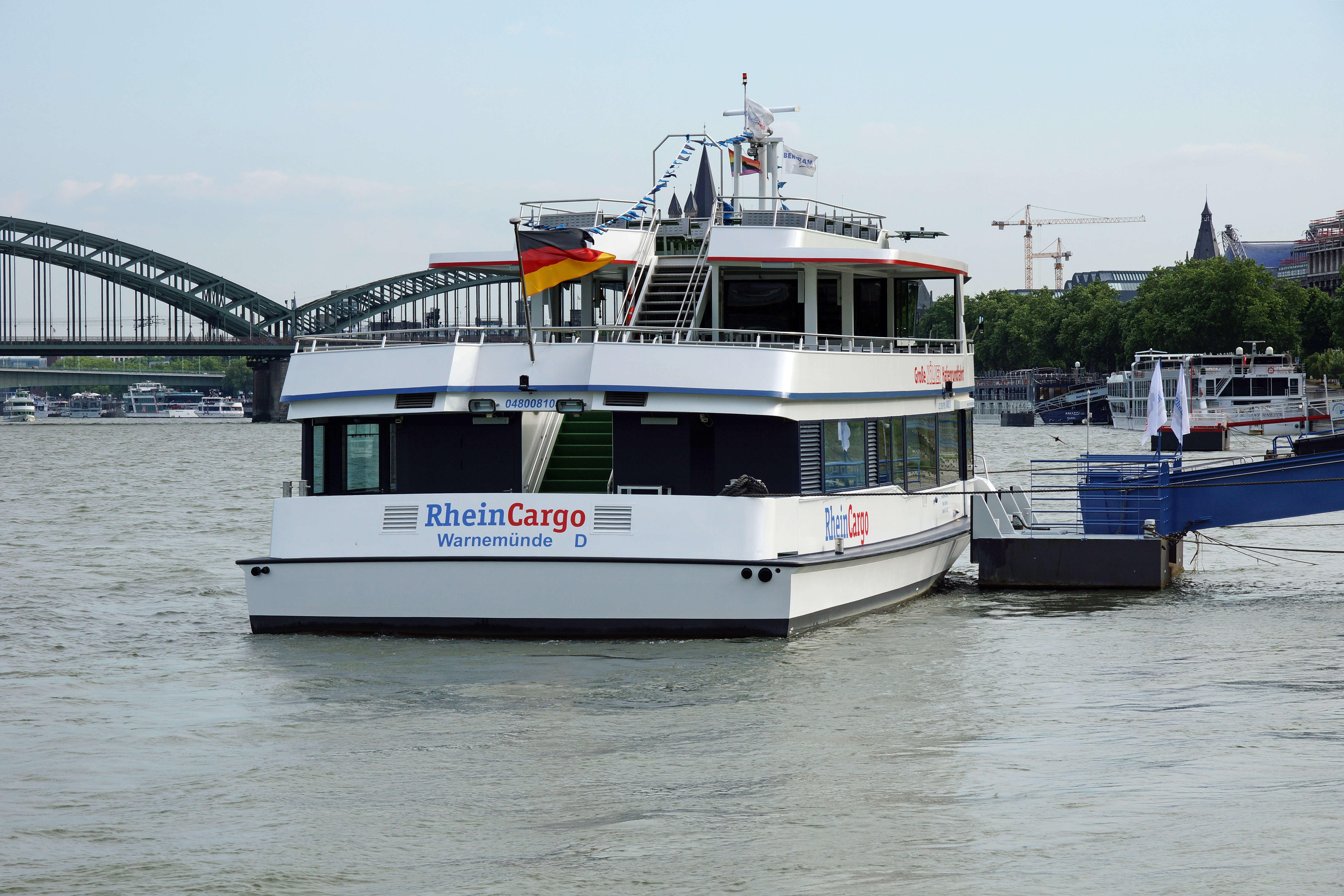 Hafenrundfahrtschiff RheinCargo am Anleger Köln.